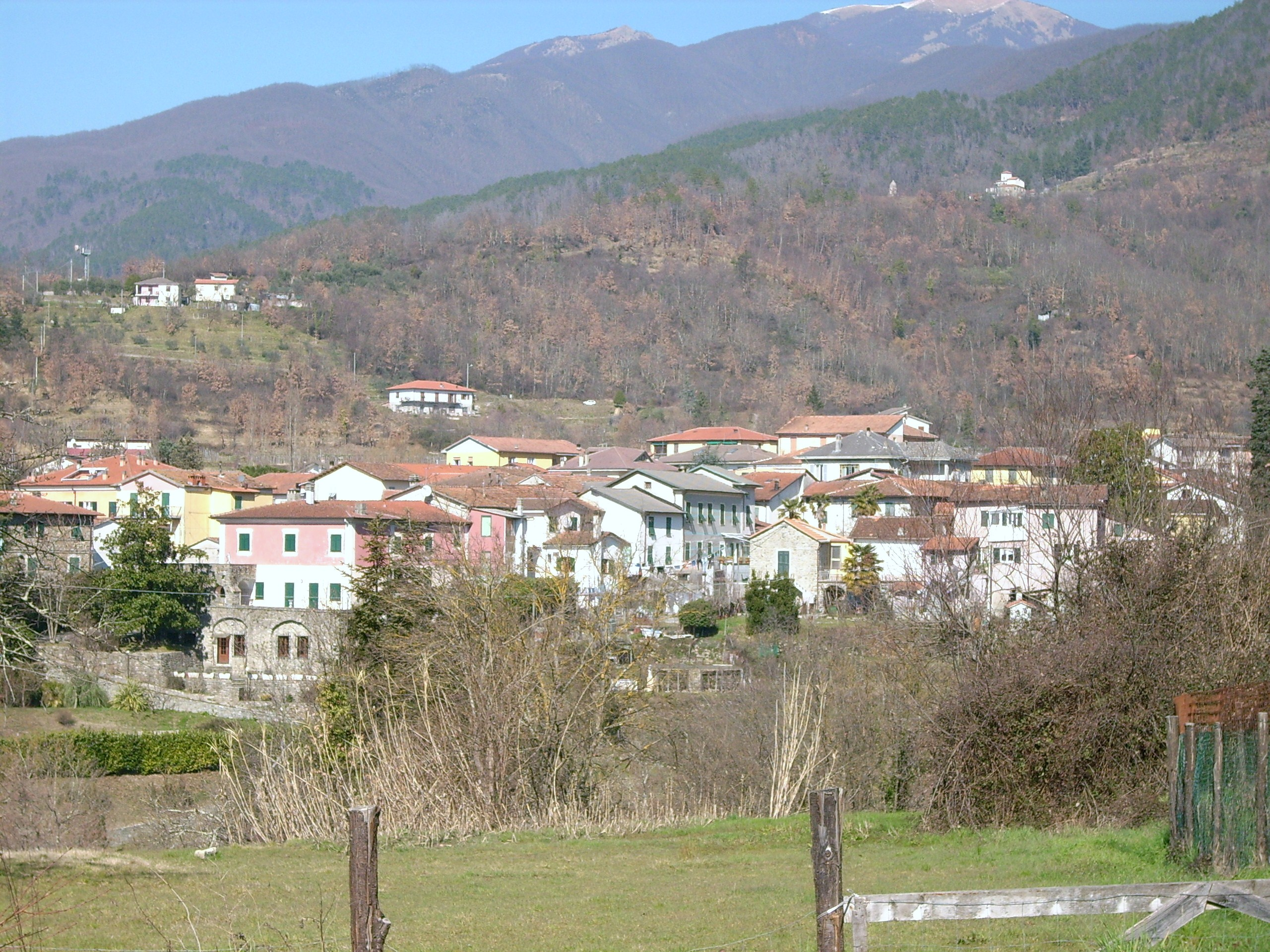 Sesta Godano, Liguria, Italy